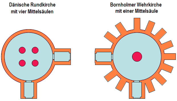 Rundkirchen